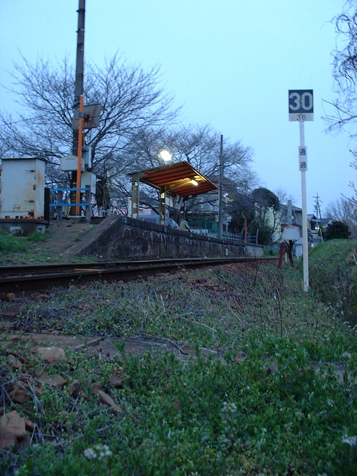 三河御船駅